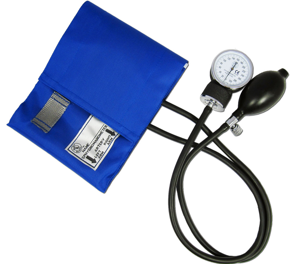 Aparato para la medición manual de la presión arterial